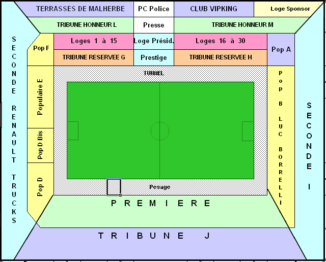 Plan des tribunes du stade Michel-d'Ornano que j'ai recrée d'après le site internet.